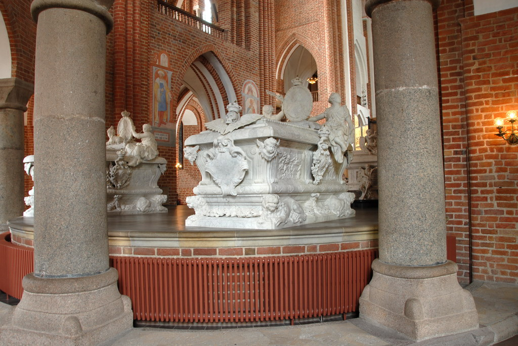 Rechts: Tombe van Charlotte Amalie (1650-1714) Links: Tombe van Frederik IV (1671-1730). Koning vanaf 1583. De sarcofagen zijn het werk van twee 18e-eeuwse beeldhouwers, onder wie de Vlaming Diederik Giercken.